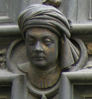 Testina 26 autoritratto